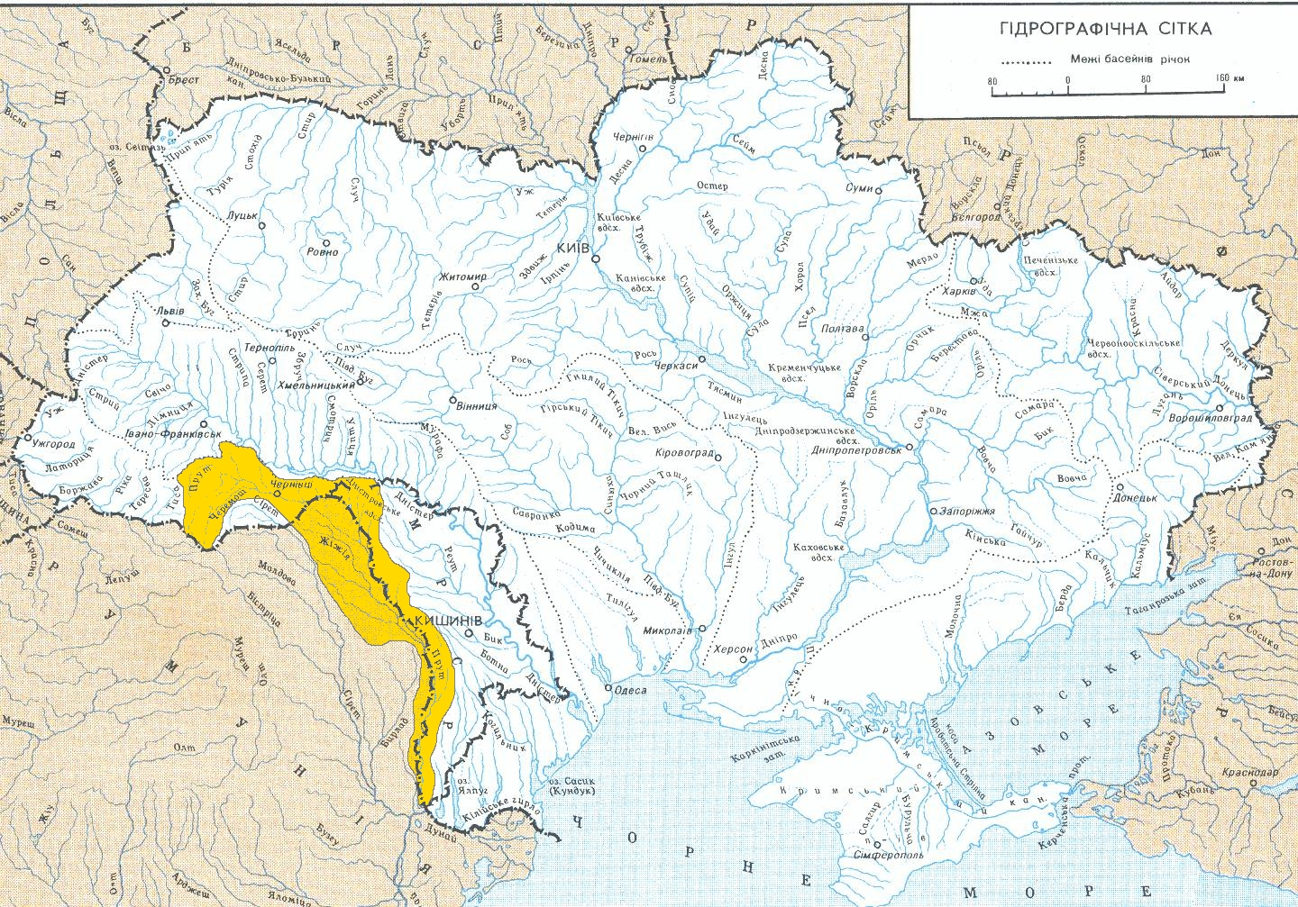 Бассейн реки Прут.